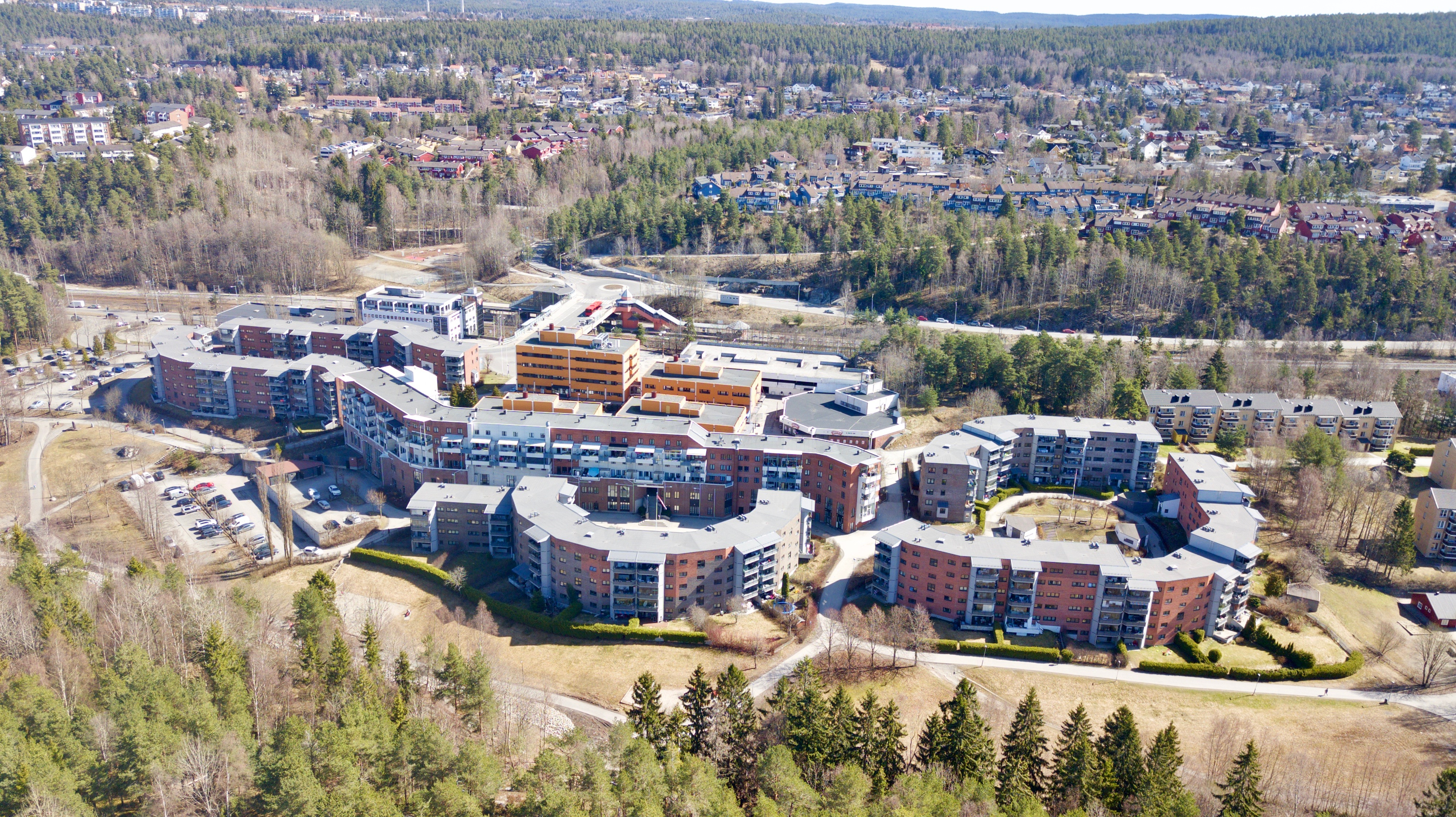 Holmlia senter og Holmlia senter vei. Oslo.